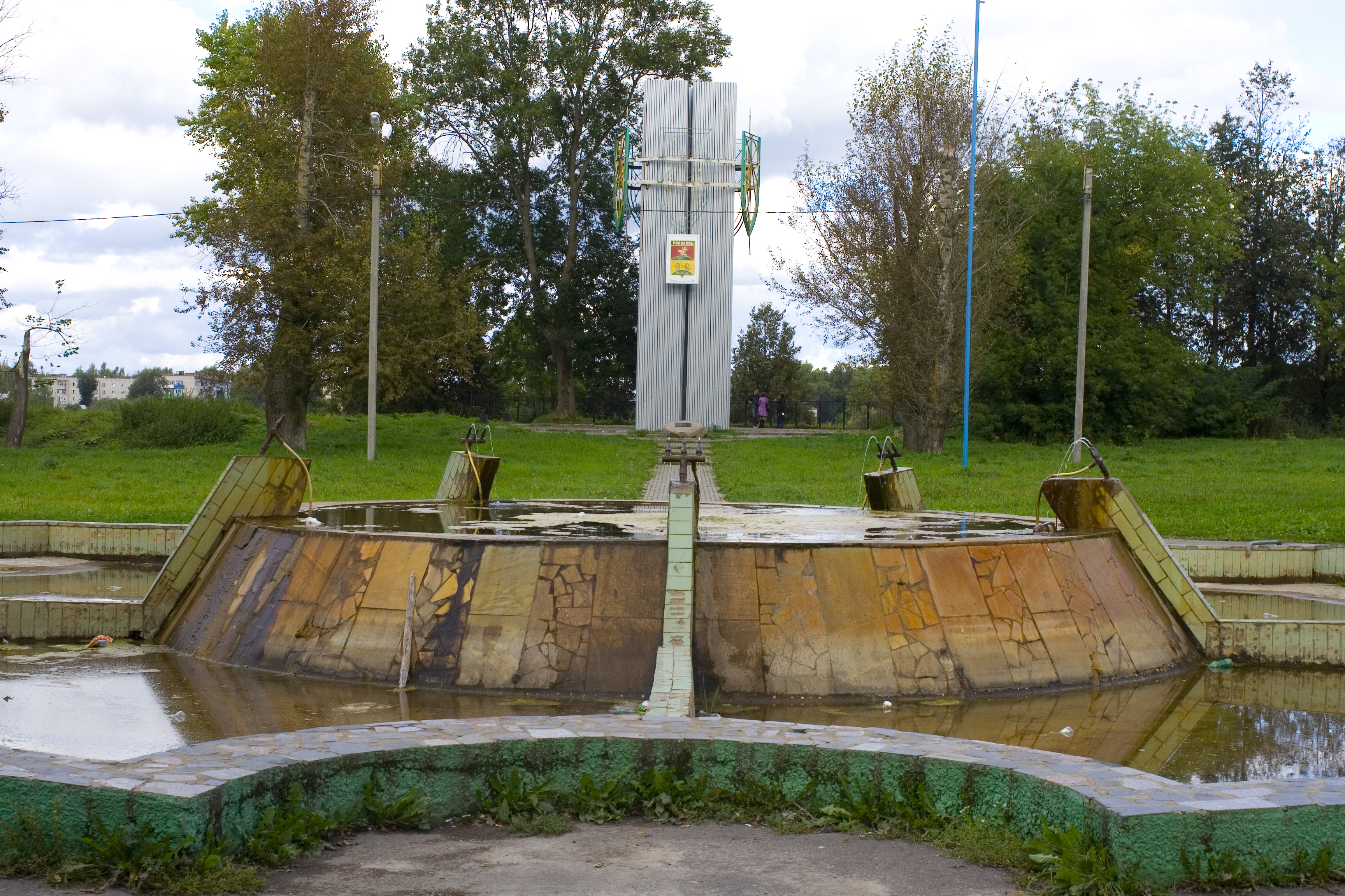 Памятник в центре Рославля